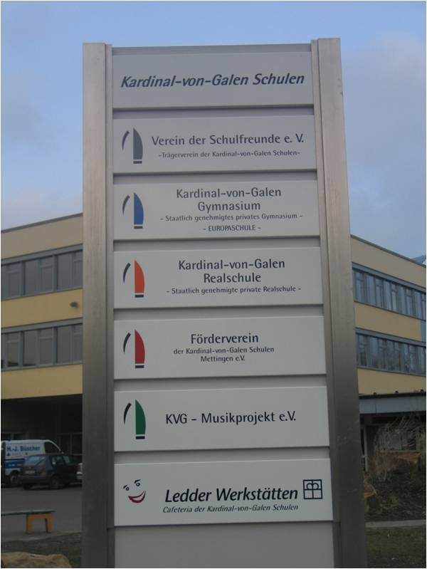 Schulschild der Kardinal-von-Galen-Schulen Mettingen, Kreis Steinfurt, Nordrhein-Westfalen, Deutschland.